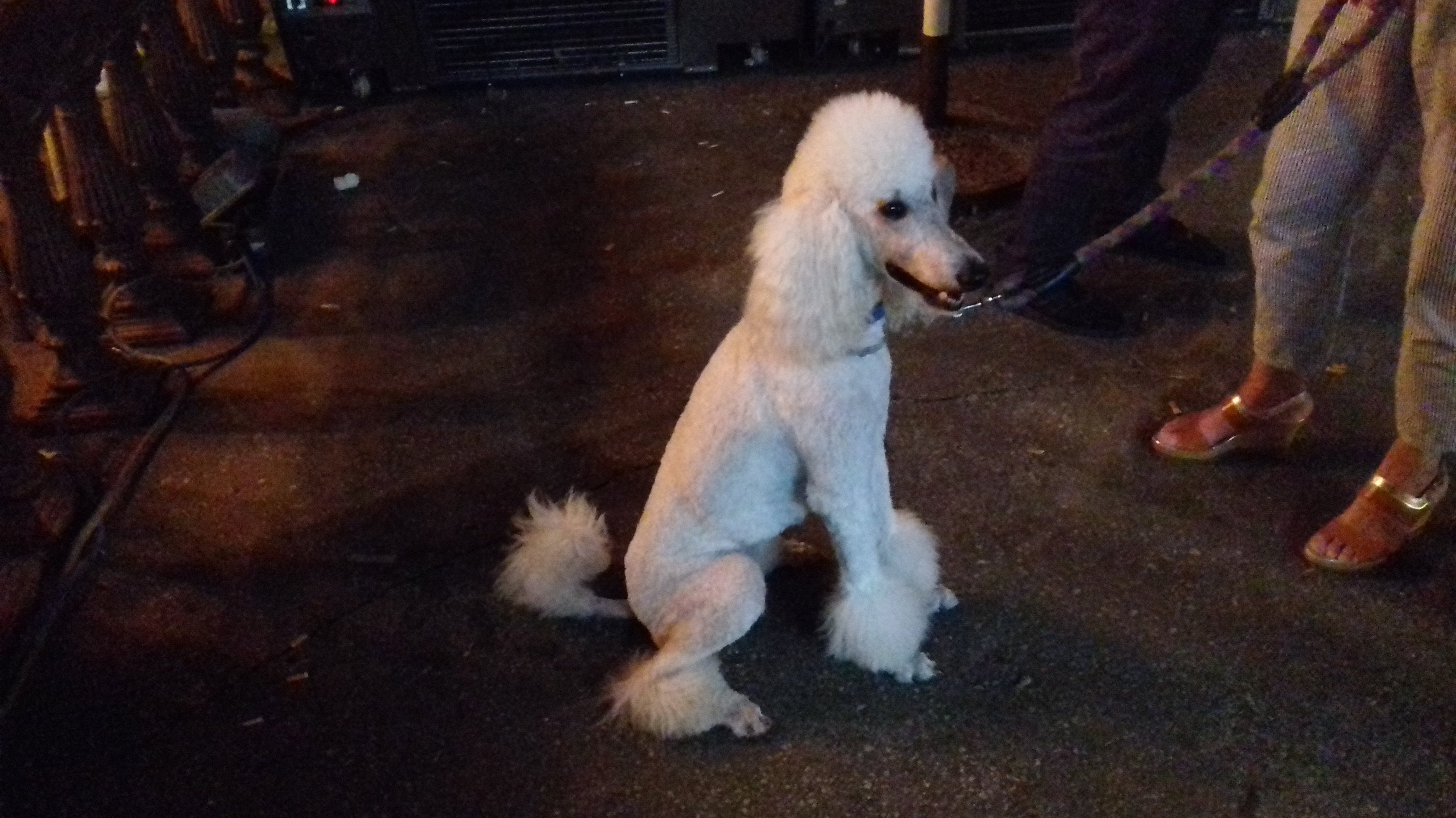 Kraljevska pudla u Zenici